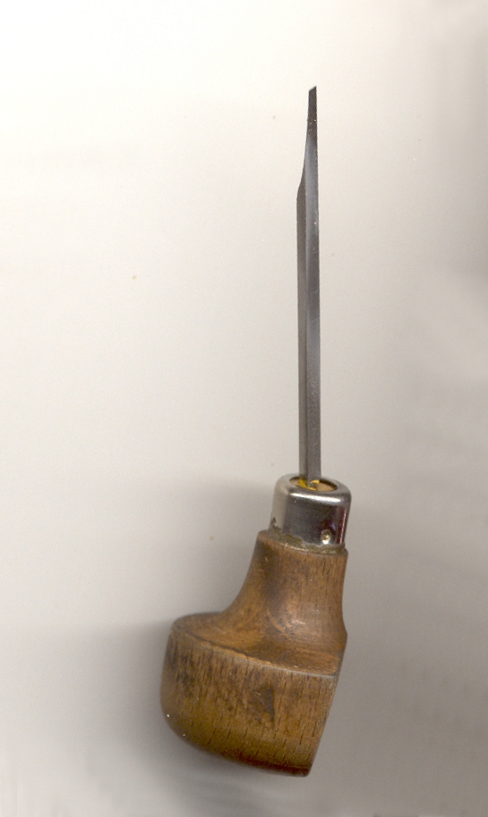 Graveersteker - burijn - burin - Gravierstichel